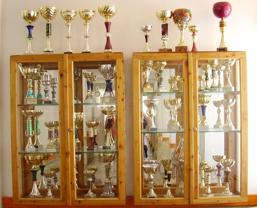 A kazincbarcikai Árpád Fejedelem Tagiskola kupái, serlegei